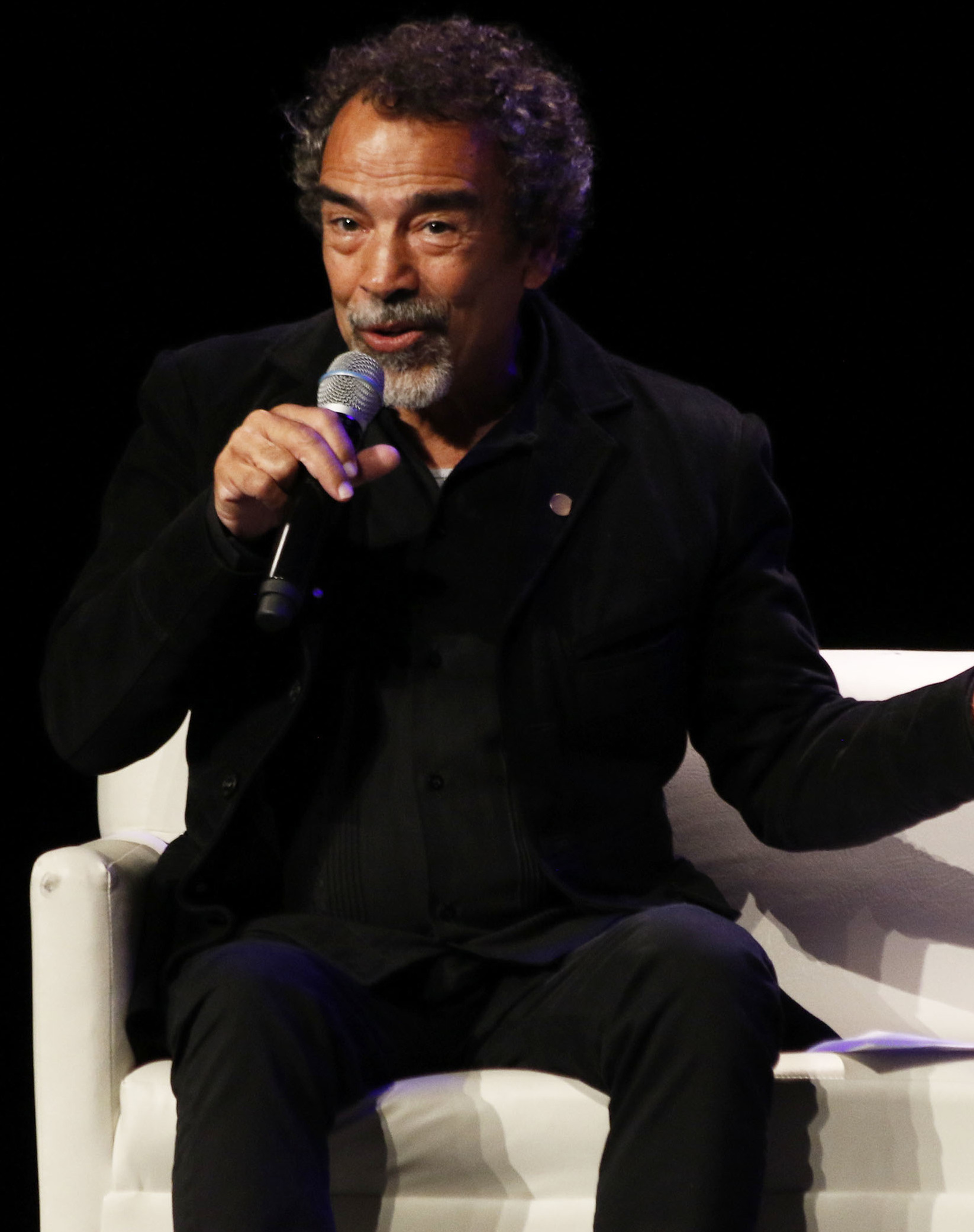 Teatro de la Ciudad Esperanza Iris, el Gobierno de la Ciudad de México declaró Patrimonio Cultural Vivo al productor, dramaturgo, director, actor y diputado constituyente Héctor Bonilla, por su destacada trayectoria artística de 55 años, el reconocimiento fue entregado por el Secretario de Cultura de la Ciudad de México, José Alfonso Suárez del Real y Aguilera. La celebración estuvo amenizada por la actuación de la cantante Rosy Arango y la conducción de Damián Alcazar.